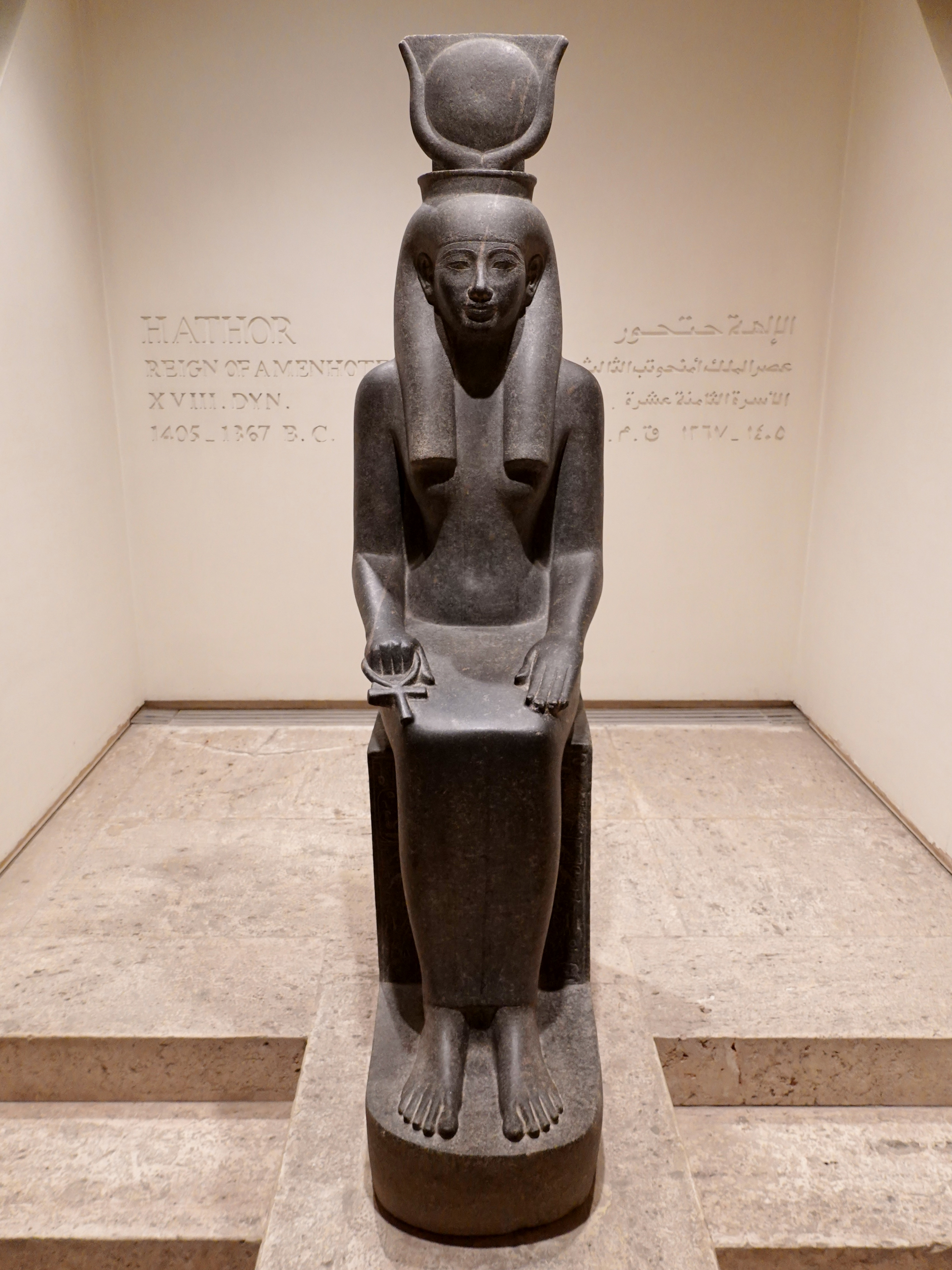 Statue der Göttin Hathor aus der Zeit des Königs Amenophis III. (Höhe: 154 cm, Diorit, 18. Dynastie), gefunden in der Cachette des Luxor-Tempels, ausgestellt im Luxor-Museum, Ägypten